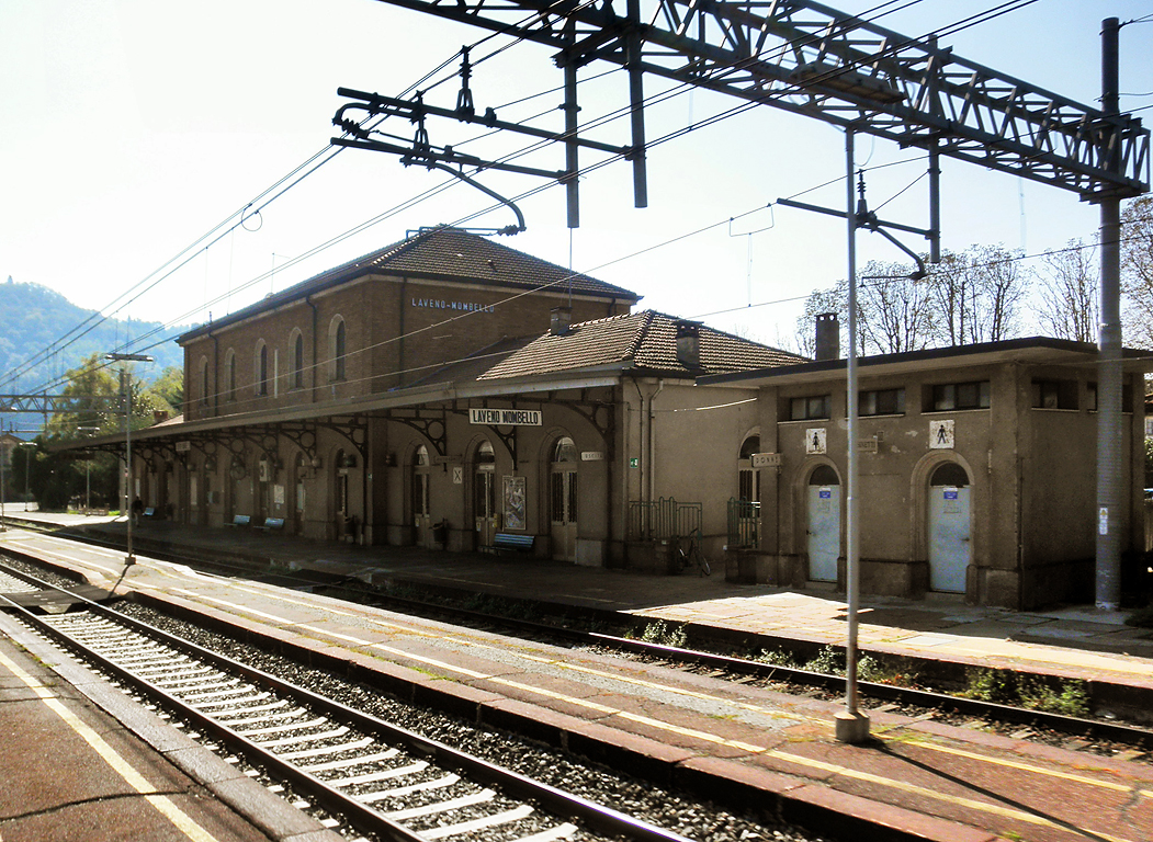 Stazione ferroviaria di Laveno-Mombello